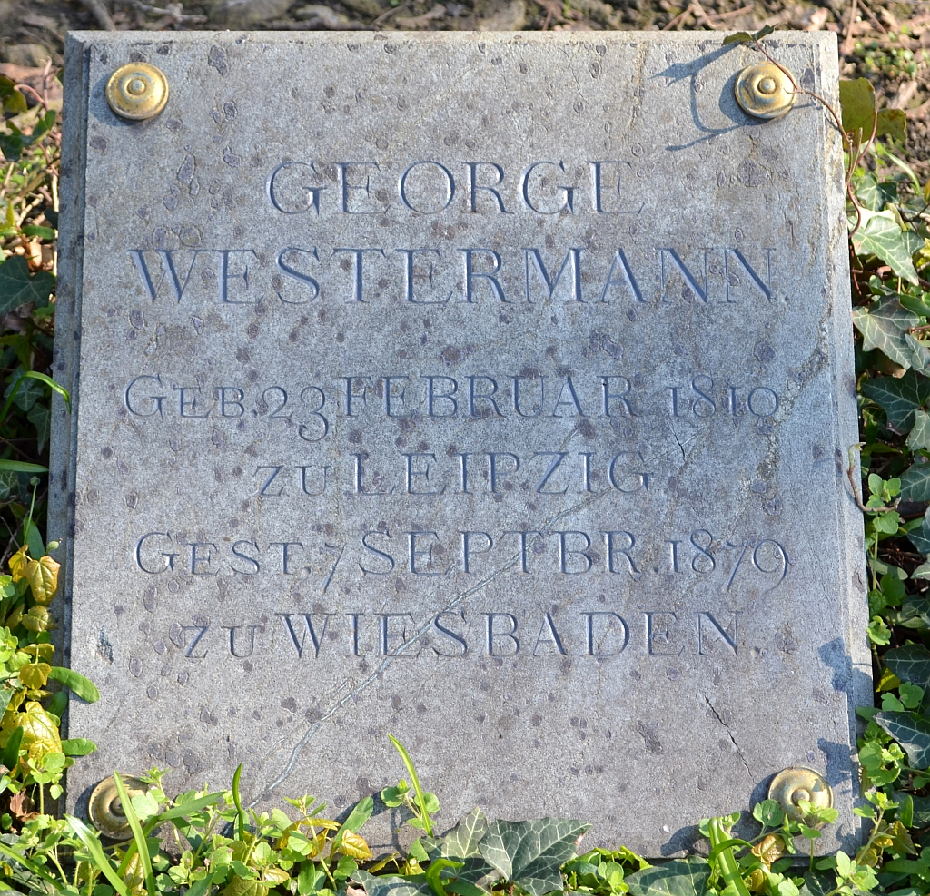 Braunschweig, Magnifriedhof: Grab George Westermanns.